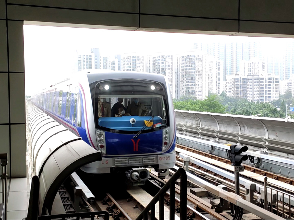 中文（中国大陆）: 调试中的6号线增购列车（2020年4月于沙贝站）